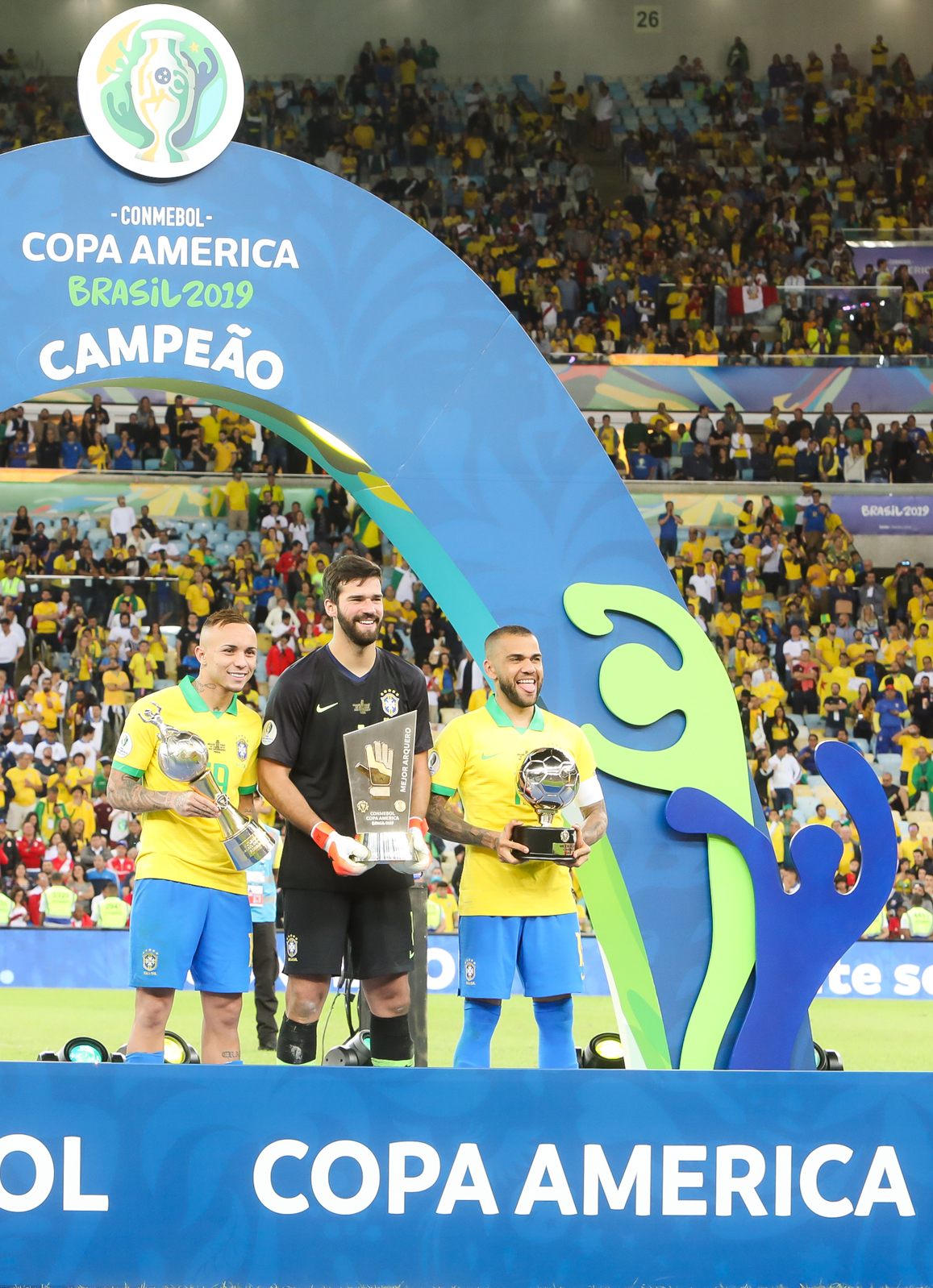 (Rio de Janeiro - RJ, 07/07/2019) Presidente da República, Jair Bolsonaro, e o Presidente da Confederação Sul-Americana de Futebol (CONMEBOL), Alejandro Domínguez, durante entrega da premiação da Copa América 2019. Foto: Clauber Cleber Caetano/PR